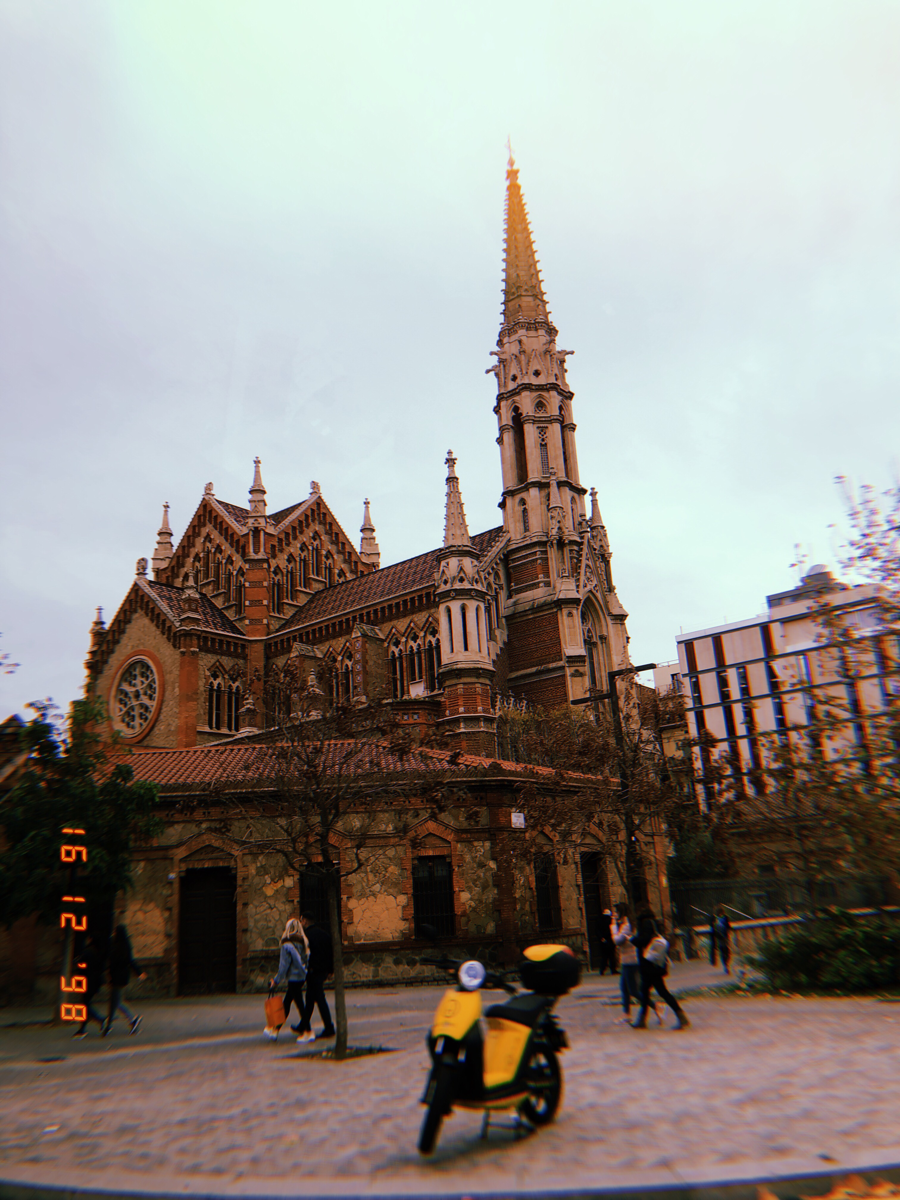 Es tracta d'un exemple de fotografia artística.